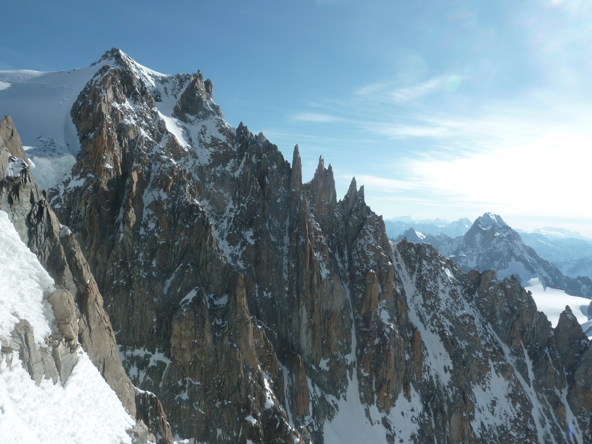 La Cresta del diavolo che scende dal Monte Bianco di Tacul. Si vedono nell'ordine L'Isolée, la Punta Carmen, la Punta Mediana, la Punta Chaubert ed il Corno del Diavolo. Più a valle si vede il col du Diable.